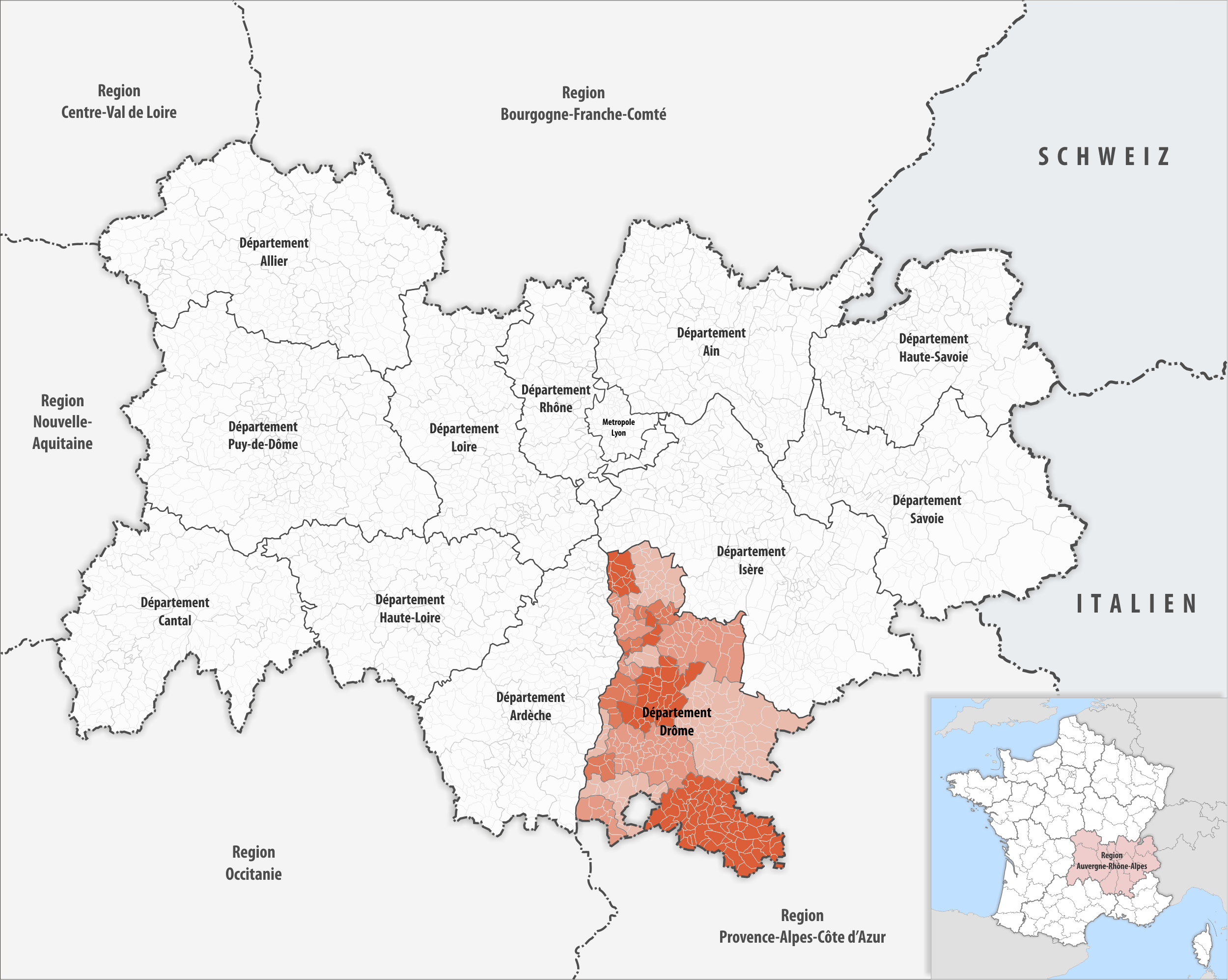 Lage des Departements Drôme